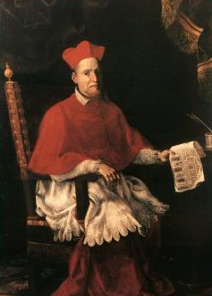 Cardinale Giulio Roma